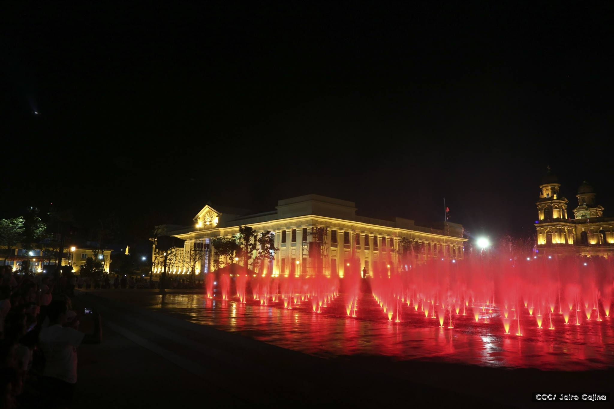 Plaza donde se ubica el Palacio Nacional De La República De Nicaragua Hoy Palacio De La Cultura Edificio Neoclassico Que Cuida De La Plaza 22 De Julio Y La Fuente Musical